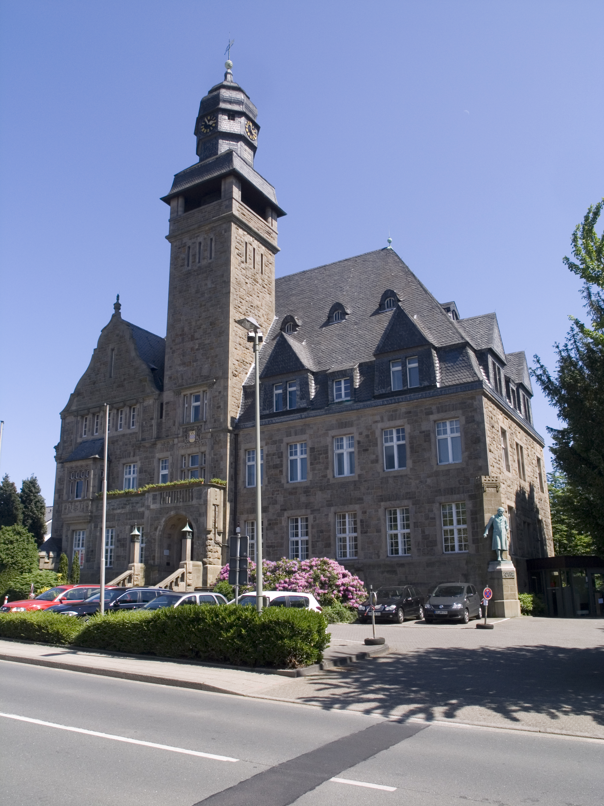 Северный Рейн - Вестфалия, Веттер (Рур) - ратуша